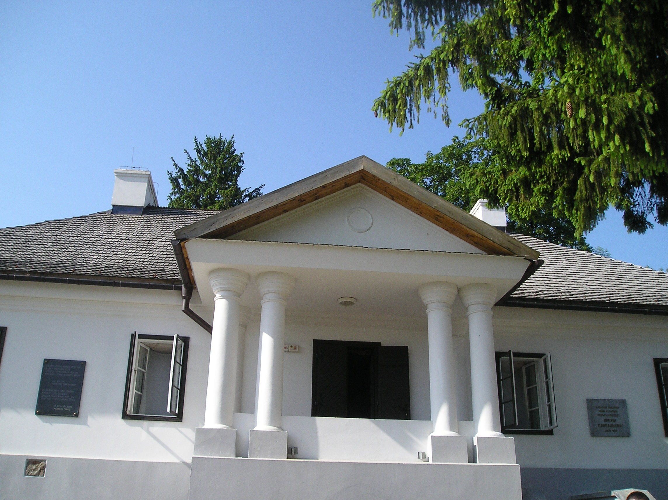 Dworek Juliusza Słowackiego